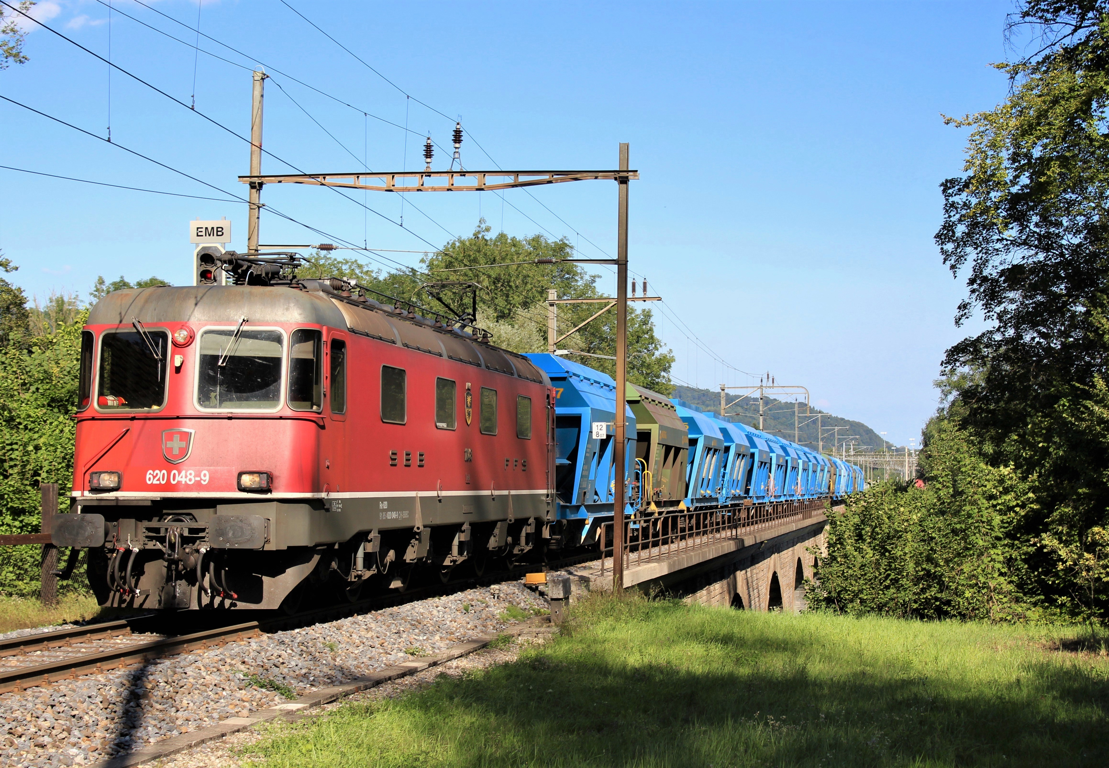 SBB Re 620 048-9 "Aigle" mit einem Kiesgüterzug zwischen Embrach-Rorbas und Bülach. Sie durchquert die Wildbachbrücke und wird in Kürze den 1.8 km langen Dettenbergtunnel durchfahren, der nach Bülach führt.